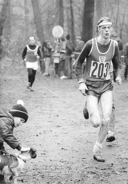 Axel Krippschock ADN-ZB Gahlbeck 18.11.84 Leipzig: 3. Lauf der Cross-Serie des DVfL der DDR im Leipziger Rosenthal- Gesamtsieger der Strecke 11 km wurde nach dem dritten Lauf Axel Krippschock vom SC Dynamo Berlin. Er hatte auch die Läufe in Halle und Berlin gewonnen.